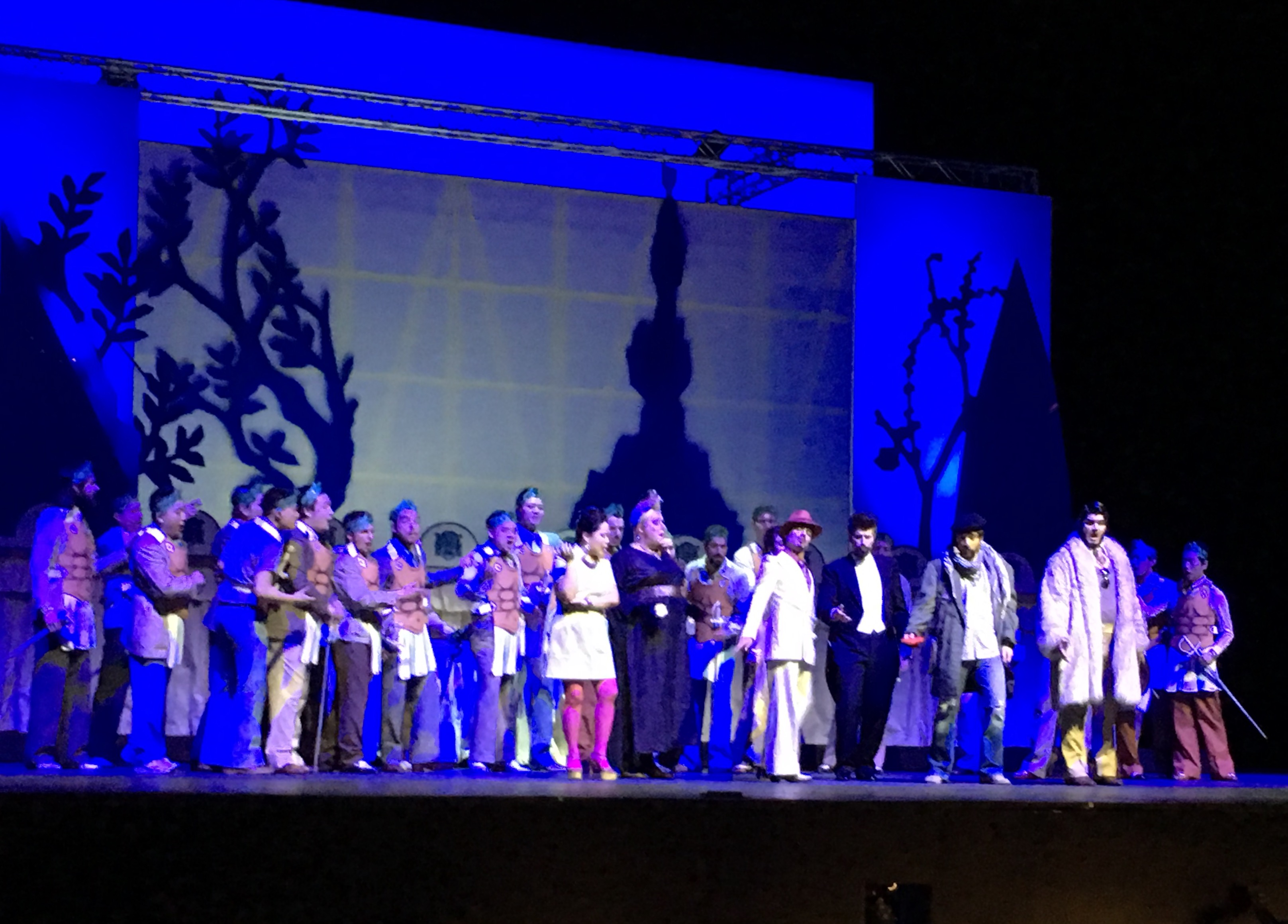 Le convenienze e inconvenienze teatrali di Gaetano Donizetti. Teatro dell'Opera di Firenze. 28 Febbraio 2017